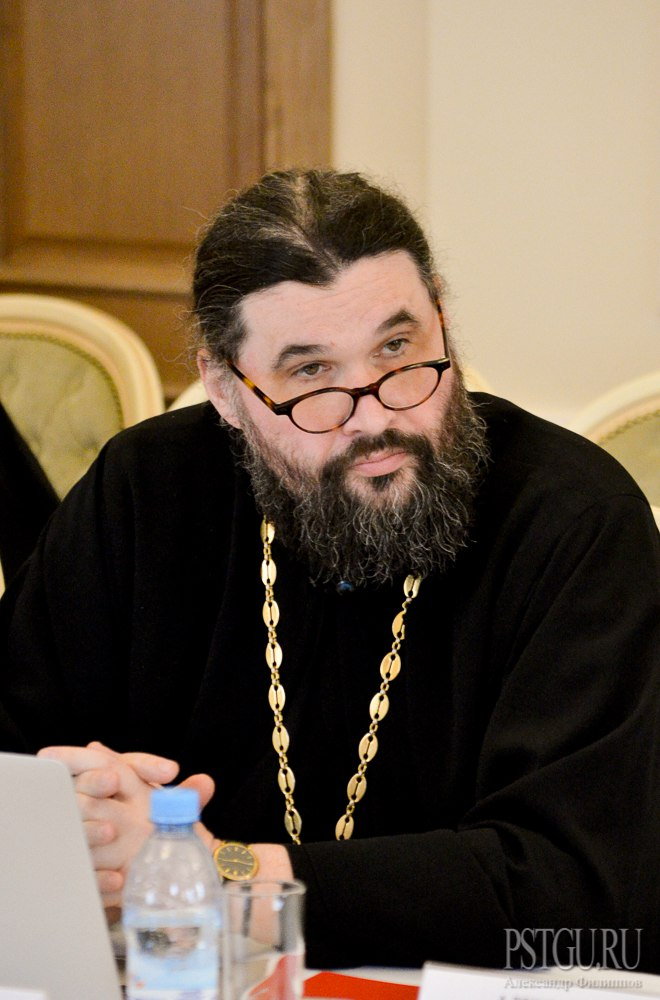 Научно-практическая конференция «Всеправославный собор мнения и ожидания»